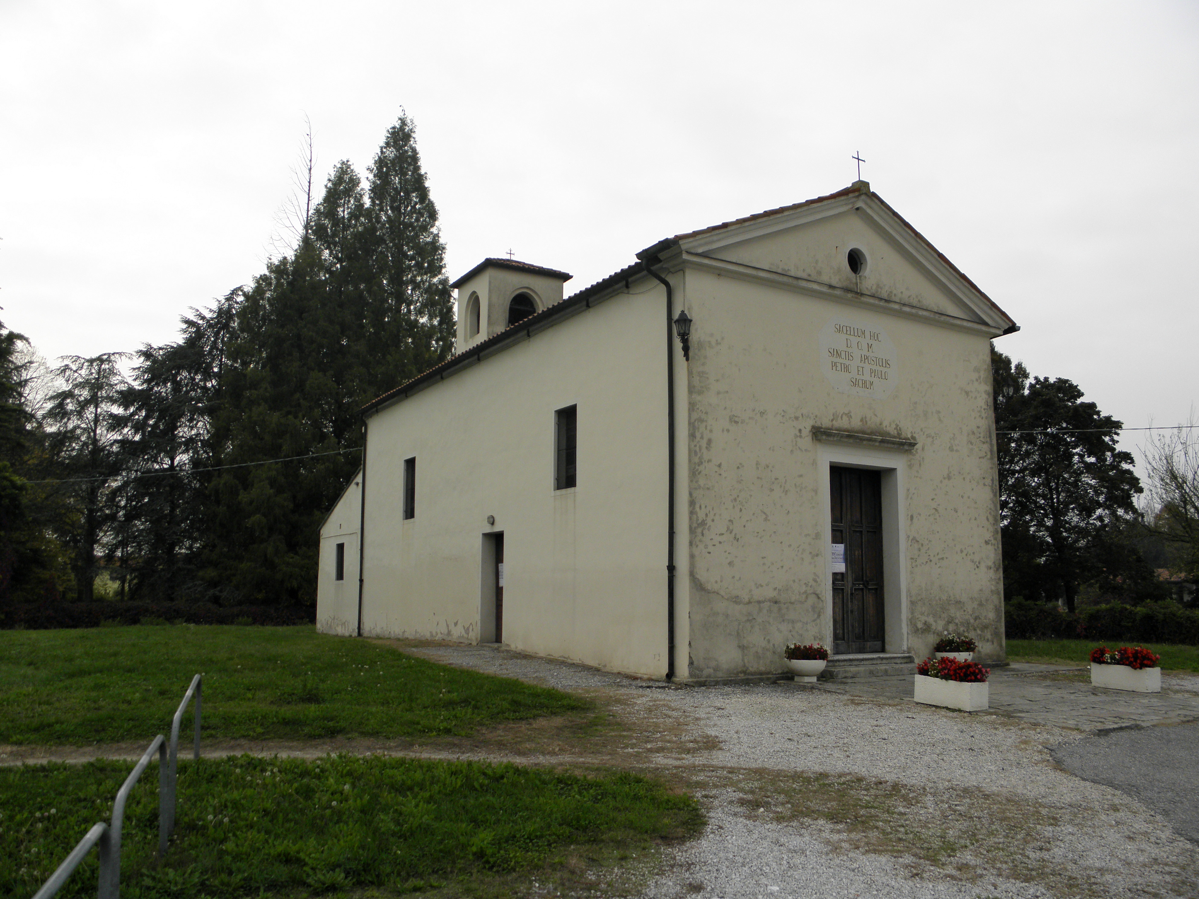 Vigonza, località Carpane: la piccola chiesa dei Santi Pietro e Paolo (XV secolo).